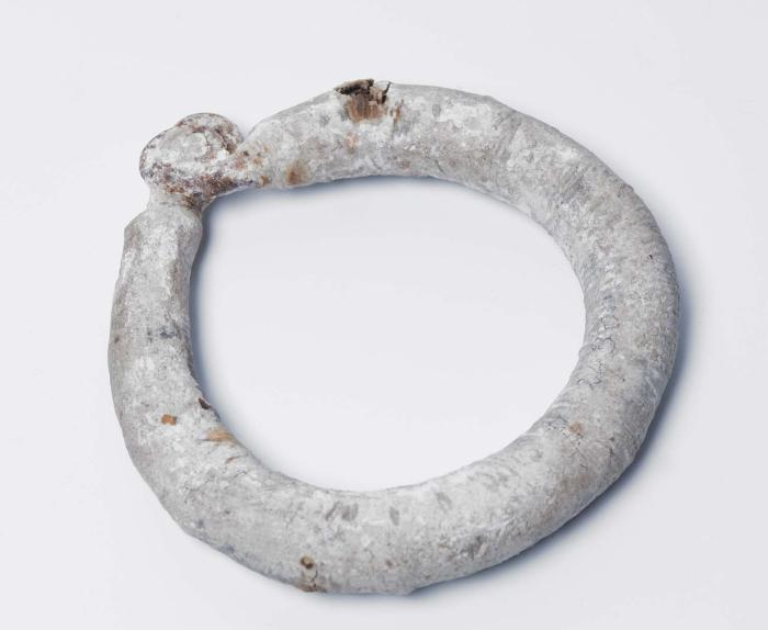 Armsieraad. Met witte klei, pemba doti, ingewreven bovenarmring. Volgens Price & Price (1980:86) hebben Marrons van verschillende groepen (er zijn er zes) accessoires met verschillende betekenissen. Behalve sieraden met puur esthetische waarde, zijn er een aantal voorwerpen met magische c.q. religieuze betekenis. Deze armbanden, halssieraden, riemen e.d. worden gedragen ter bescherming tegen hekserij en toverij. Ook ziekte wordt vaak behandeld m.b.v. deze items. Zulke voorwerpen bevatten vaak kaurischelpjes, in Suriname papa-moni geheten. Zulke schelpjes waren vroeger bij de Papa-negers van Dahomey in West-Afrika als betaalmiddel in gebruik. Tevens werden er kwaad afwerende en gelukbrengende krachten aan toegeschreven; Lelyveld, Th. van, 1919:469. Deze krachten zouden ze hebben vanwege de overeenkomst in vorm met het vrouwelijk geslachtsdeel; Perry, 19..) , papegaaienveertjes, munten en kruidenmengsels in stoffen omhulsels. Echter, de ingrediënten die gebruikt kunnen worden zijn talloos, omdat de samenstelling van elke obia afhangt van een bepaalde godheid, orakel of geest. Hoewel deze objecten dus gemaakt worden als ritueel hulpmiddel, spelen ook esthetische waarden een rol. Pemba doti, witte klei, is erg belangrijk bij magische rituelen van de Marrons.. Bovenarmring